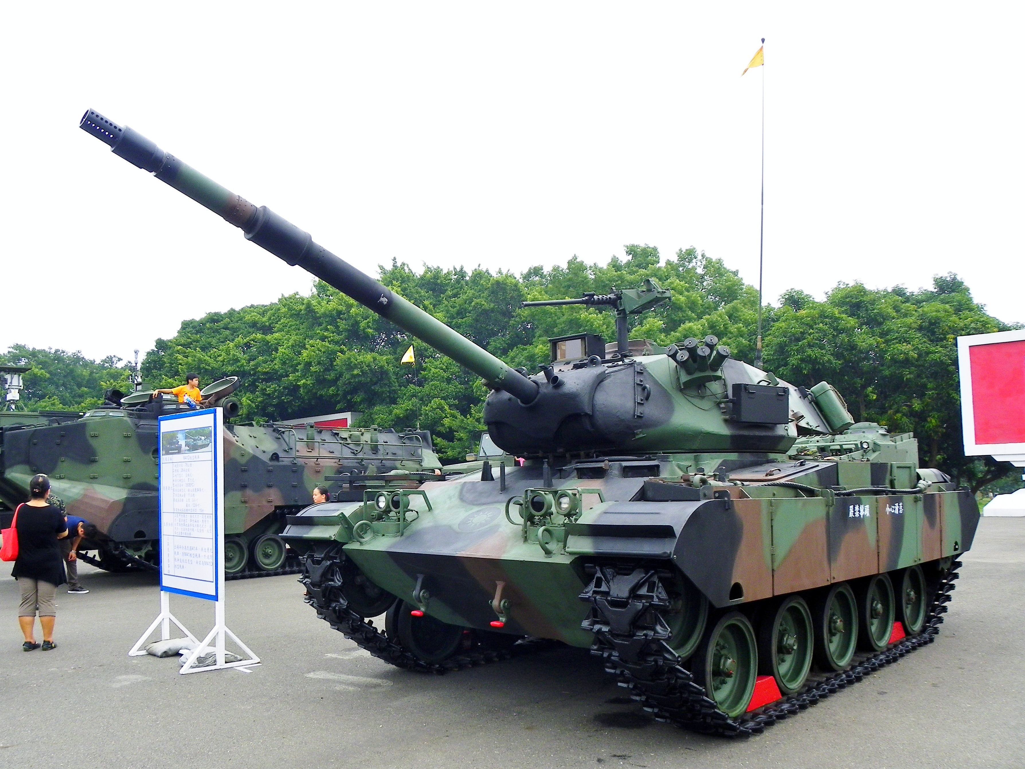 2011年成功嶺營區開放活動中，展出之M41D輕戰車。